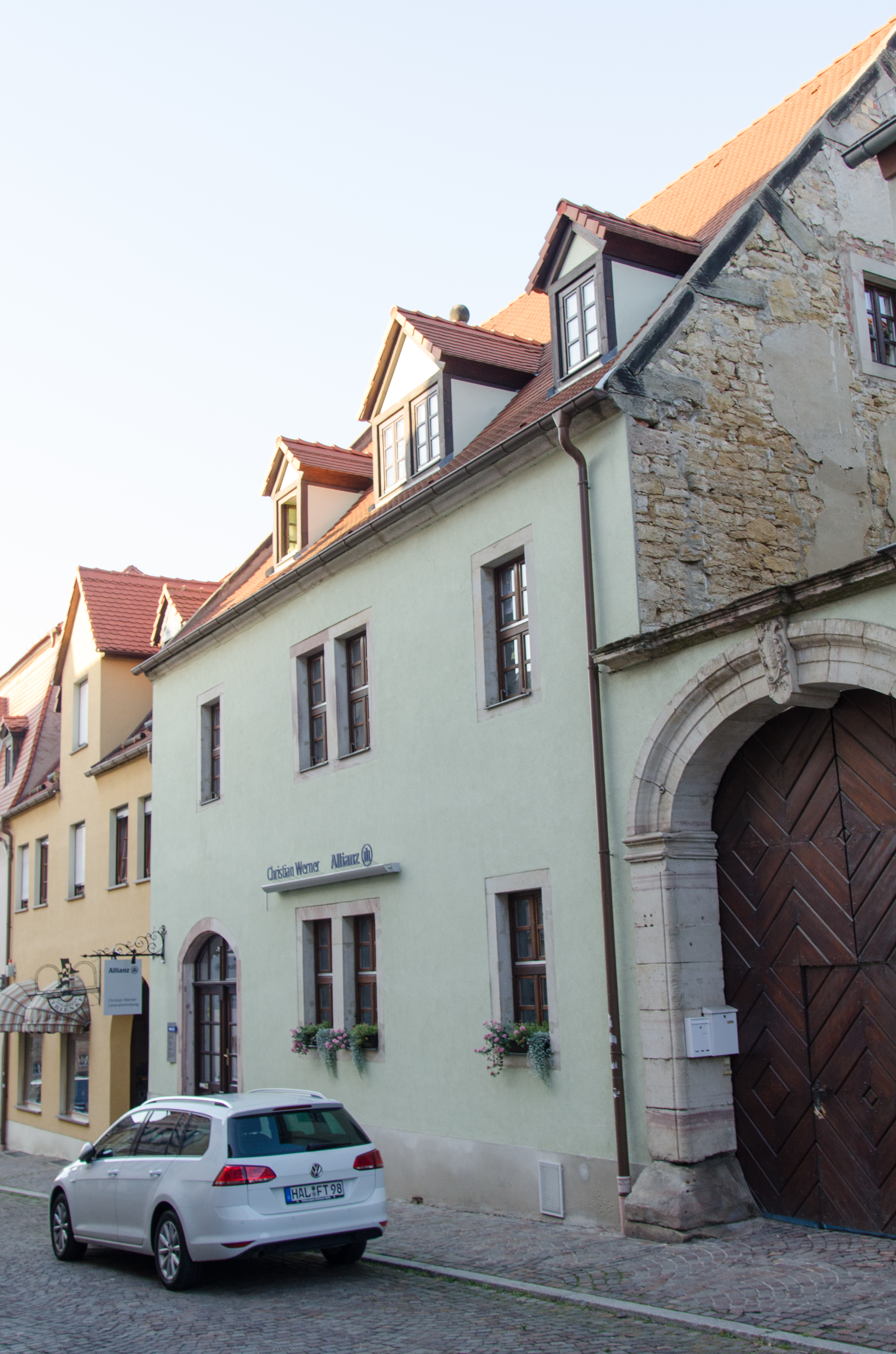 Querfurt, Nebraer Straße 9